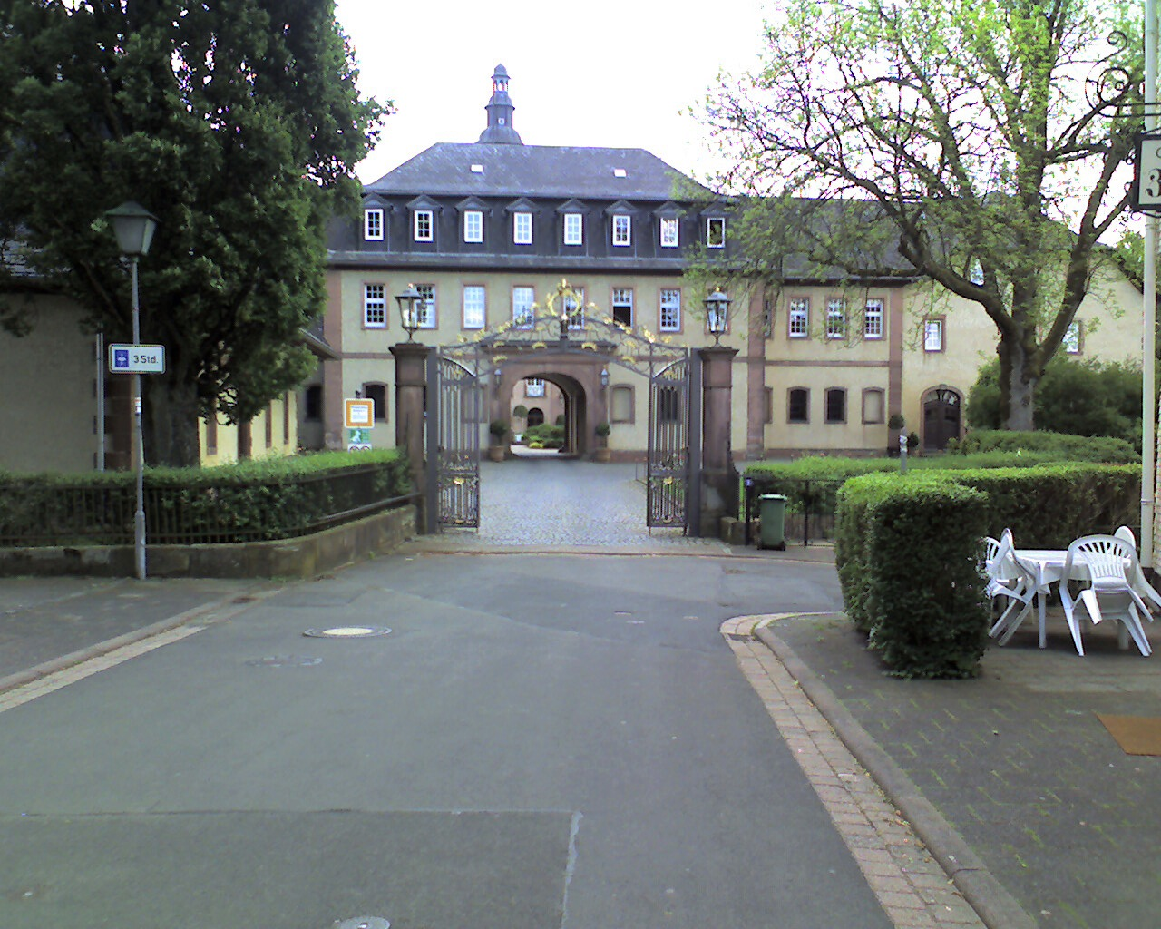 Schloß Birstein Haupteingang